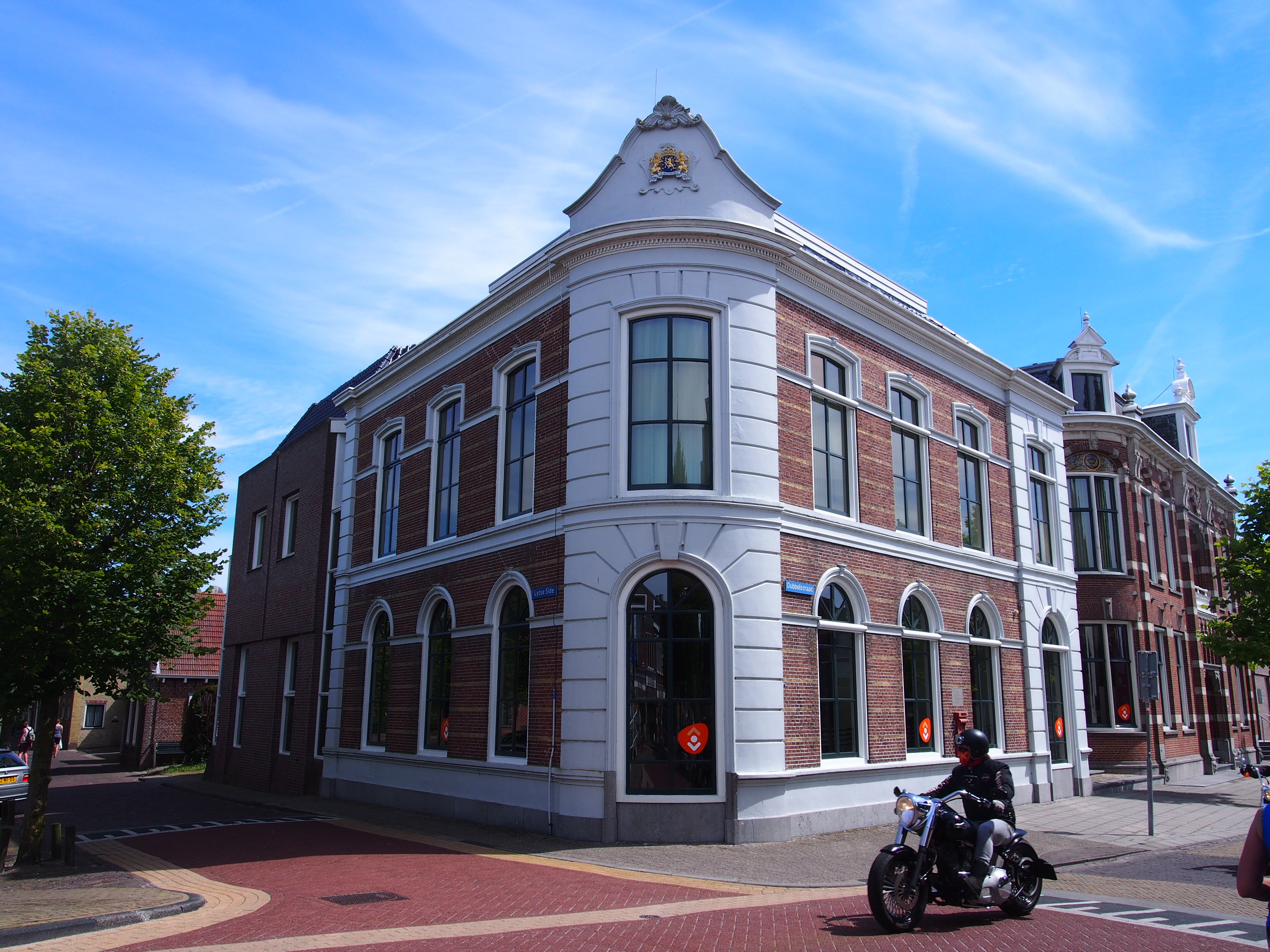 Gemeentehuis, Dubbelstraat 1-1b, Balk